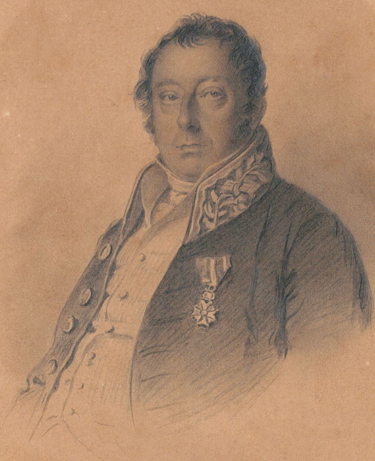 Mr Tammo Sypkens (Groningen, 27-03-1780 - Zuidbroek, 12-11-1842).Achterop het portret staat met potlood geschreven: "President Gerechtshof te Groningen" en "President Curator der Universiteit".